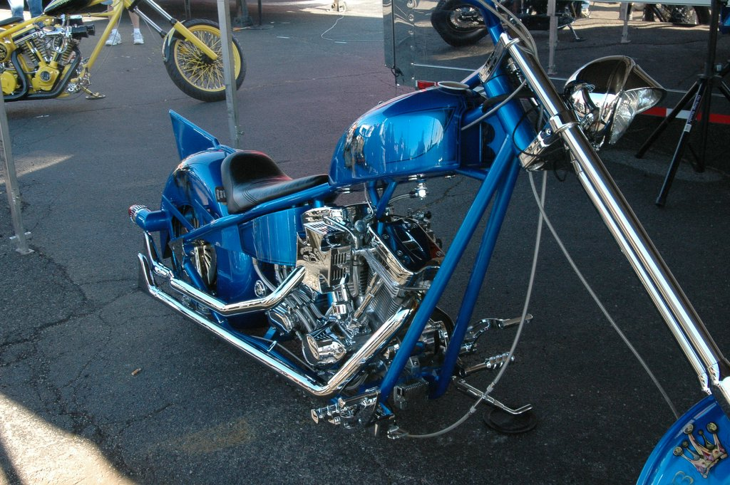 Mikeys Blues Bike